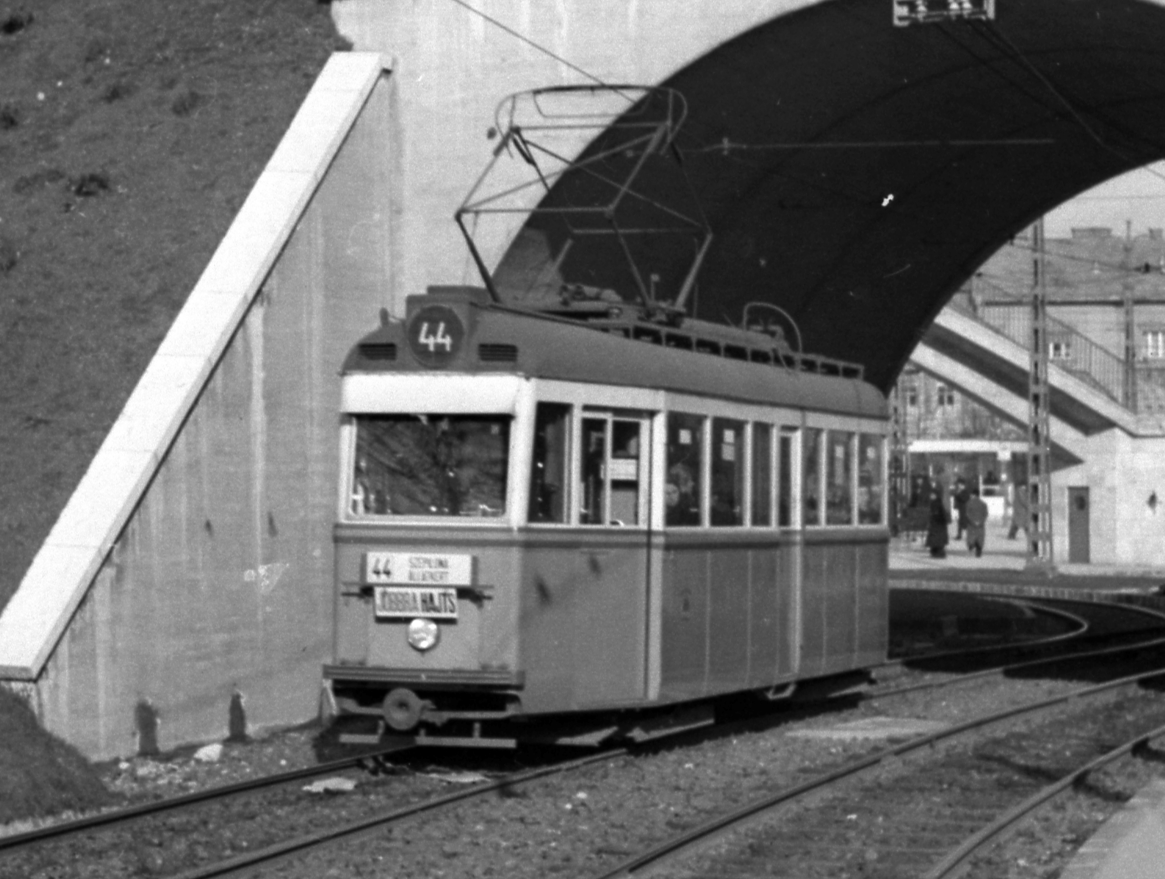 44-es villamos a Széll Kálmán téri villamosalagútnál.